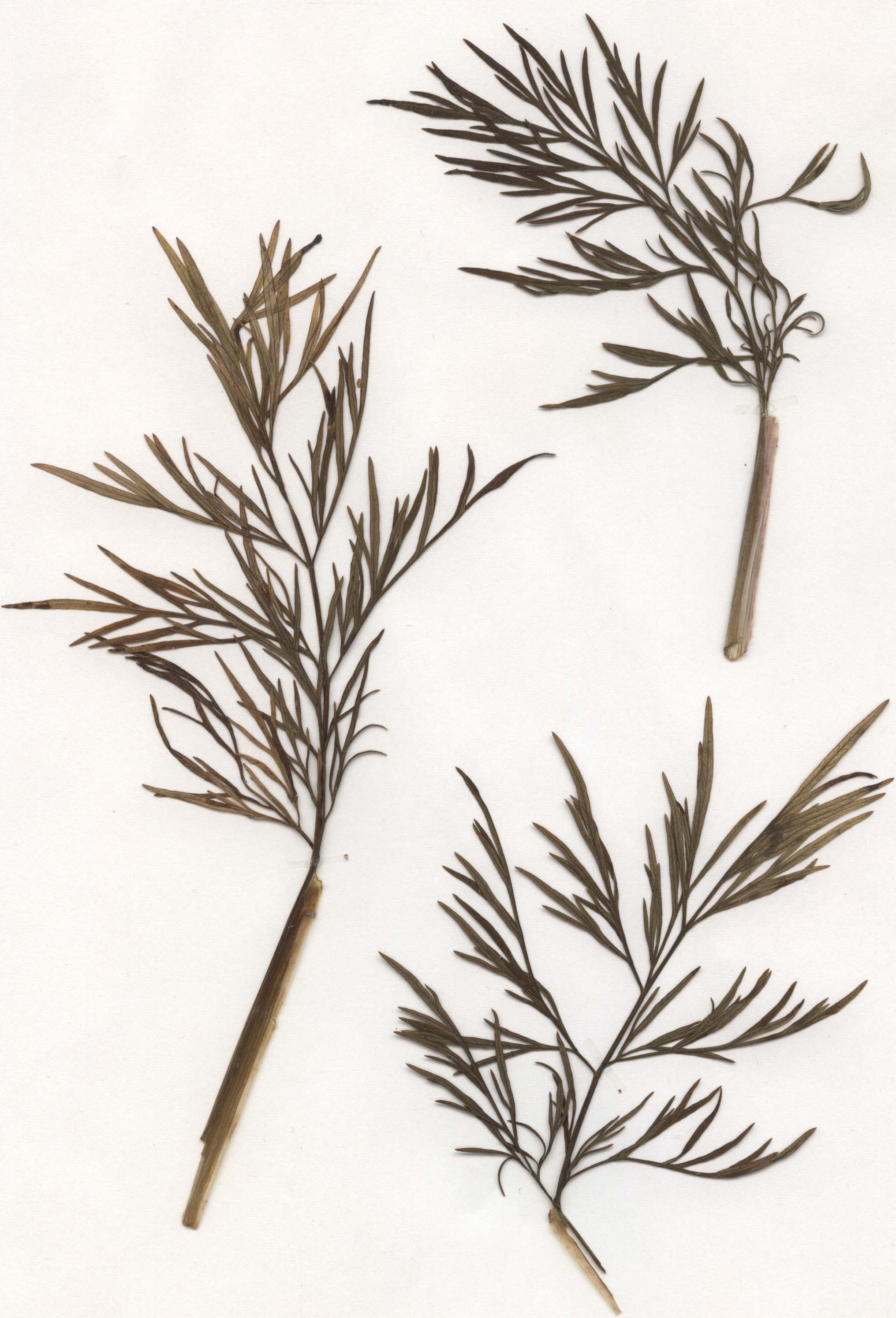 Cnidium dubium, Stängelblätter, eigener Herbarbeleg von 1985, Unterfranken